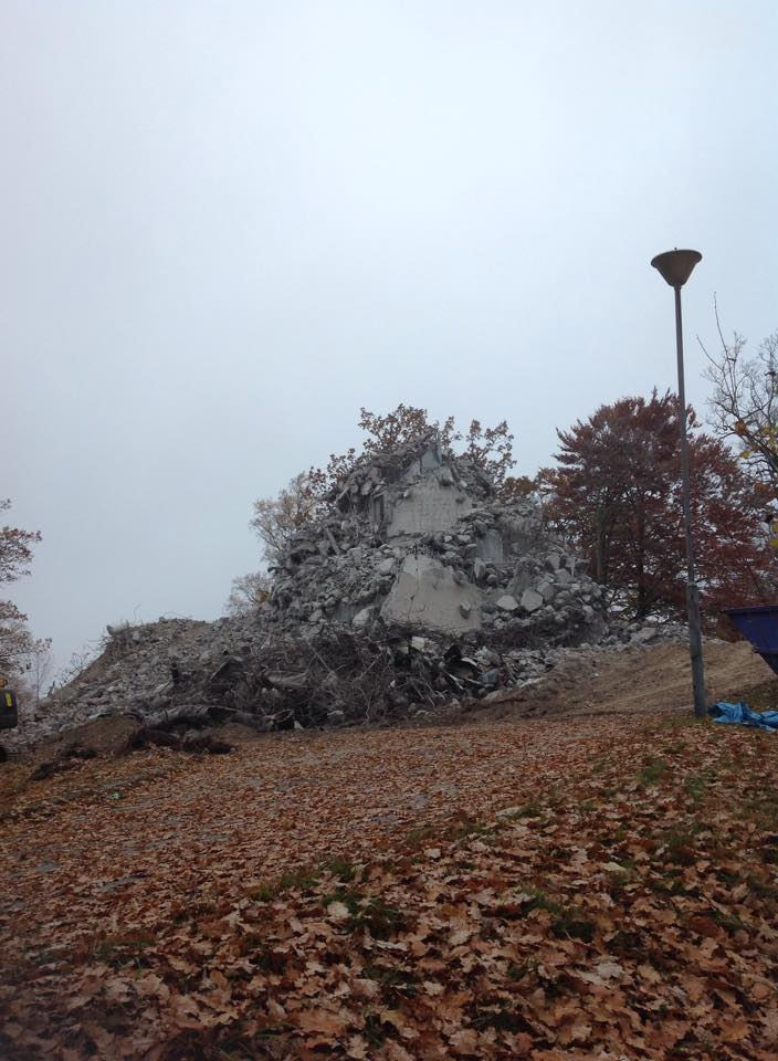 Växjö vattentorn, rivet hösten 2015